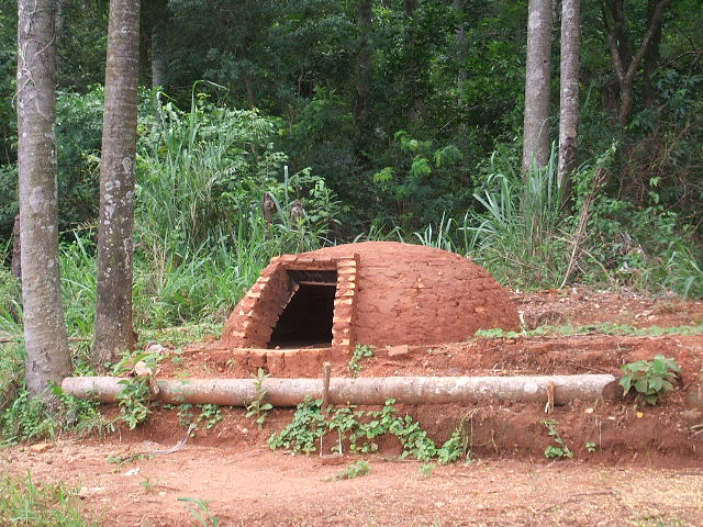 Tatacuá. Horno de ladrillos. Paraguay